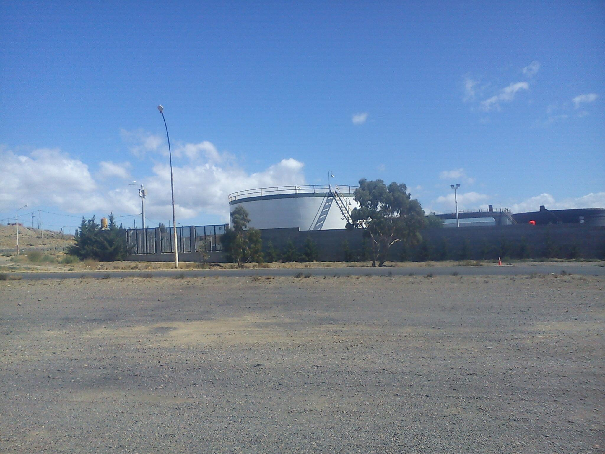 Situacion de la escasez de agua